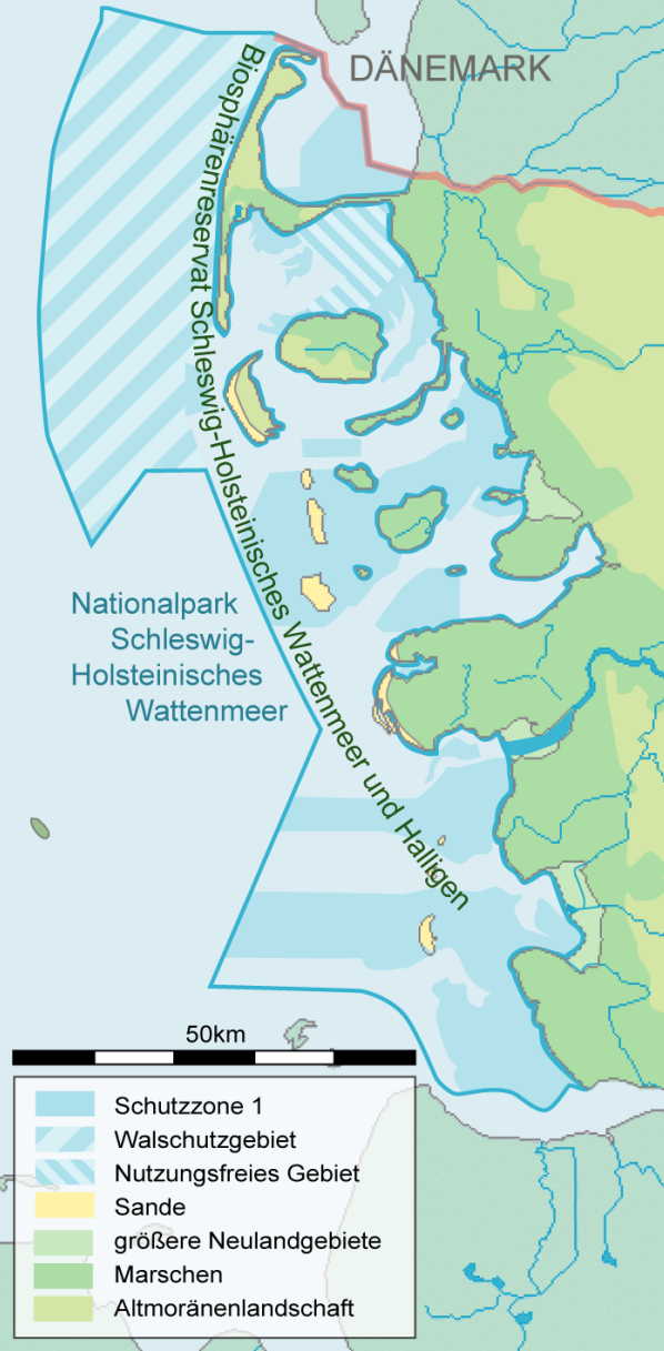 Nationalpark und Naturparke in Schleswig-Holstein